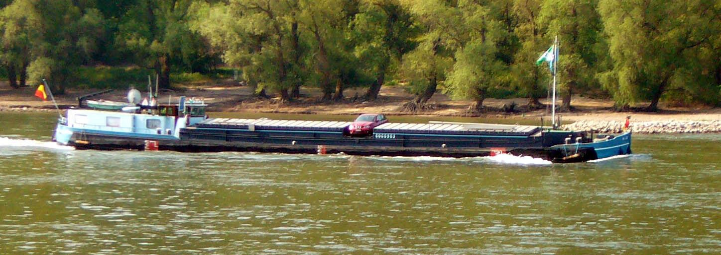 Peniche